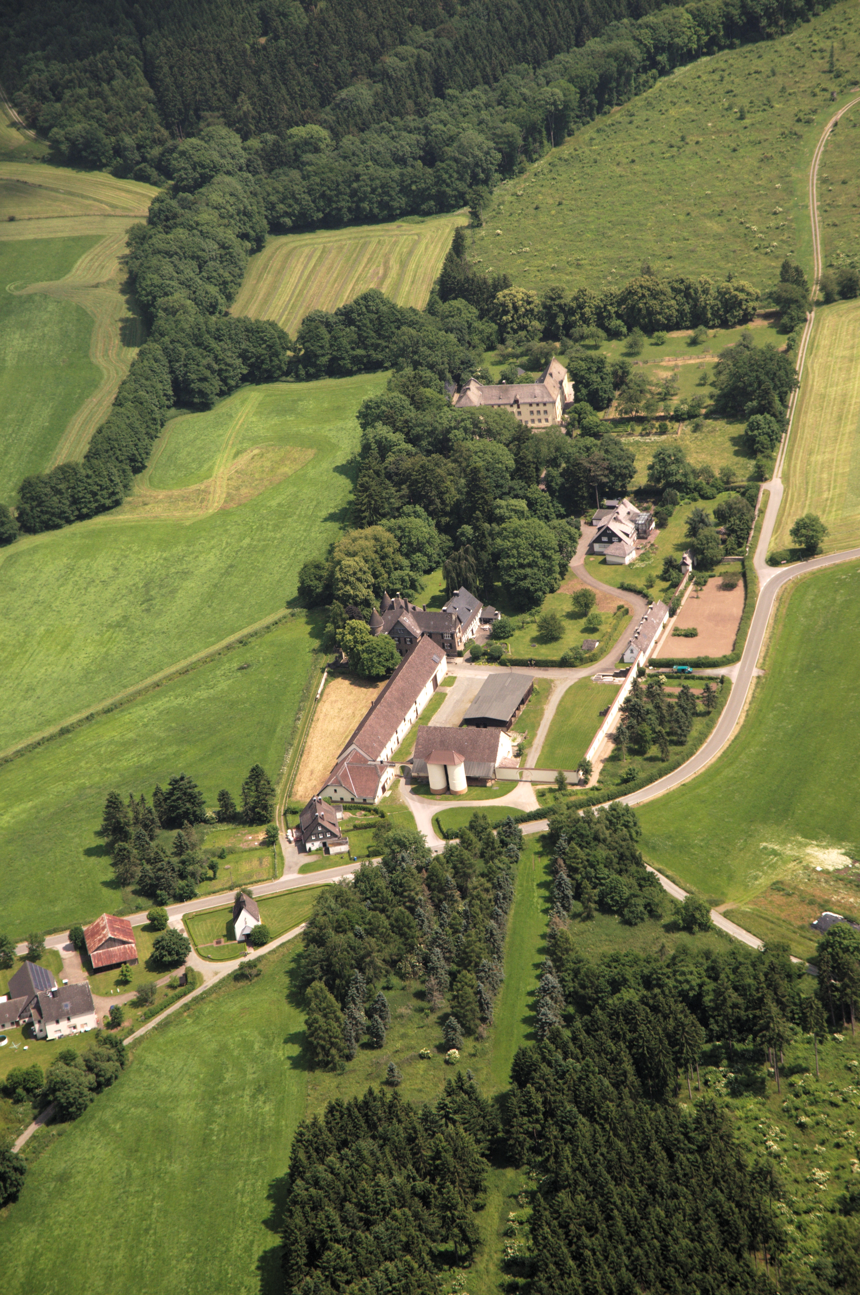 Fotoflug Sauerland-Ost, Ehem. Augustinerinnenkloster Glindfeld in Medebach-Glindfeld